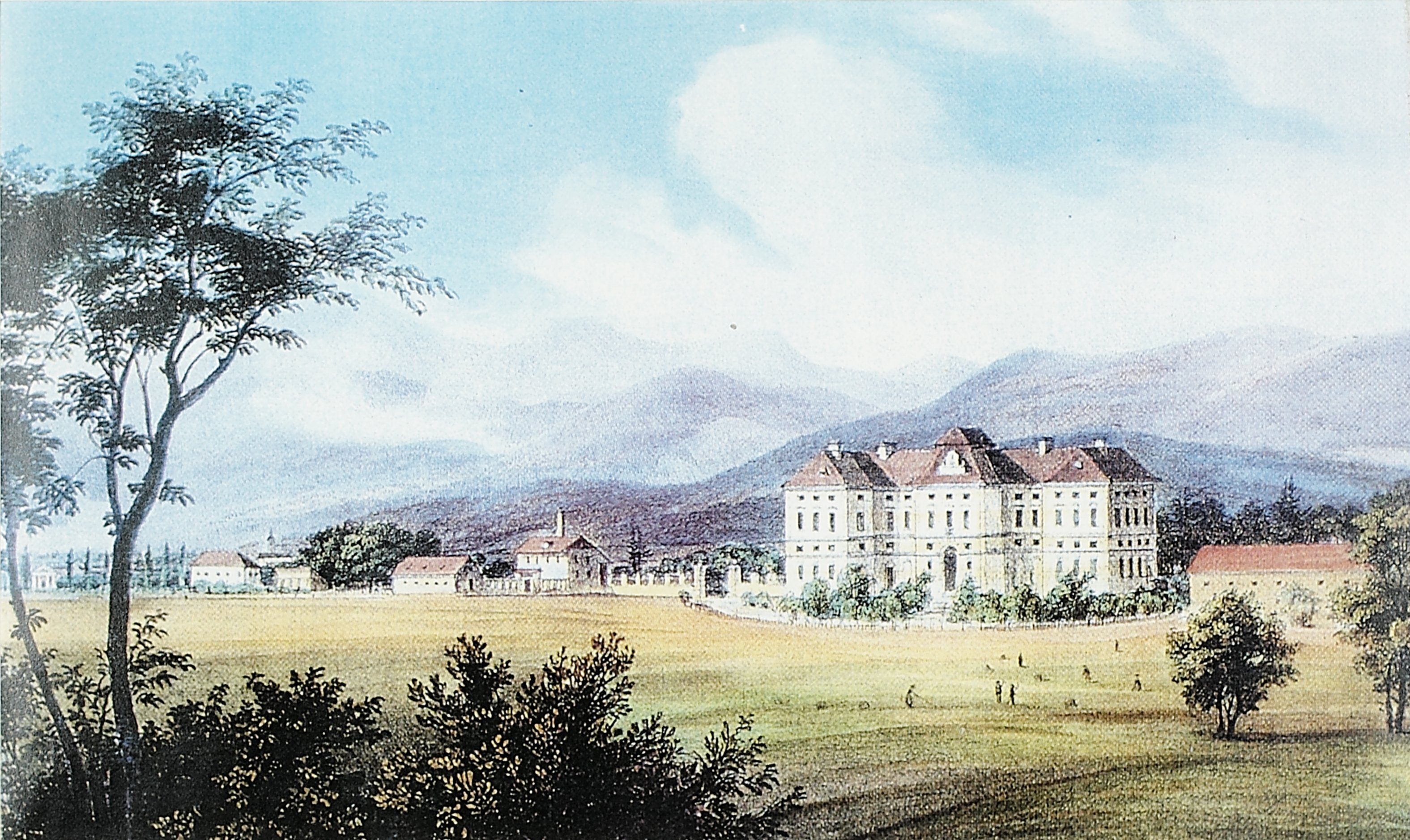 reprodukcija, orig. hrani Graz, Štajerski deželni arhiv.